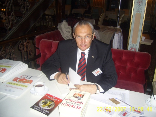 Dr. Tahir Tamer Kumkale bir imza gününde